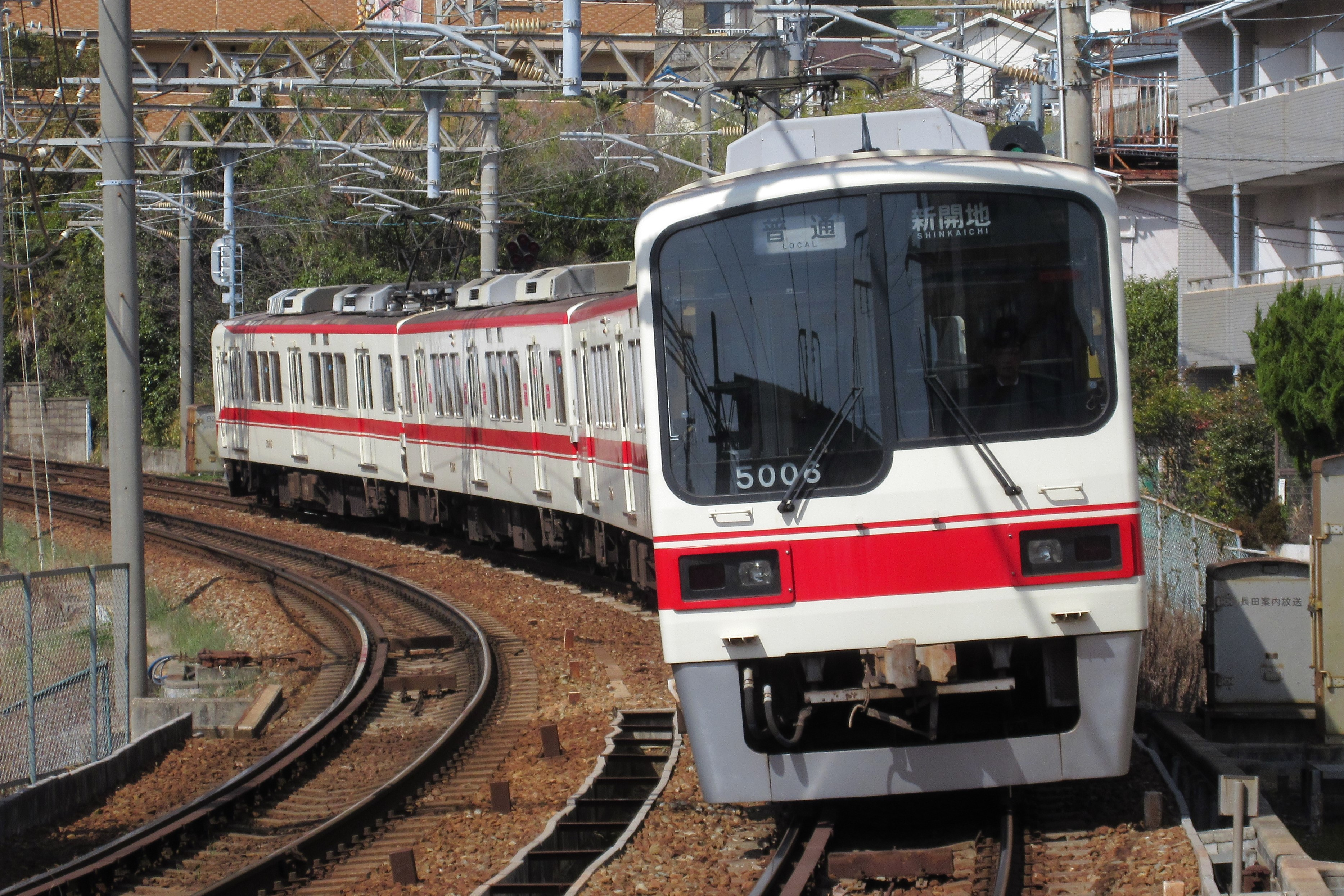 神戸電鉄5006 (長田駅にて)